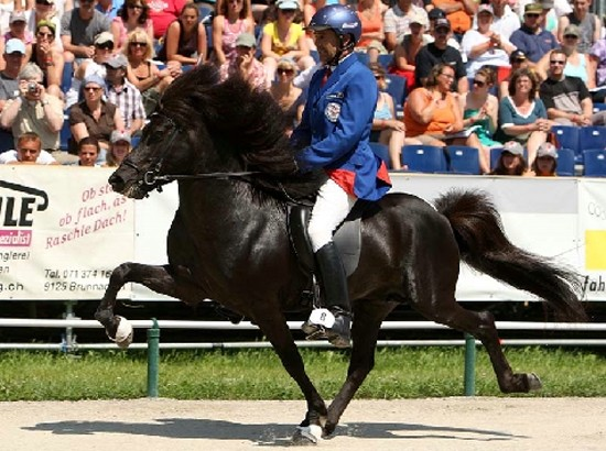 Tidligere verdensmester i Tölt Hvinur fra Holtsmúla med rytter Jóhann Skúlason i hurtig tölt.